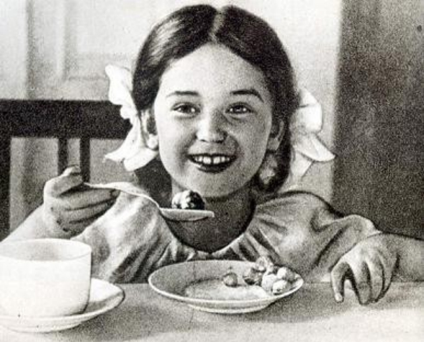 Teresa Bogusławska, polska poetka; uczestniczka powstania warszawskiego, „Najmłodsza Poetka Walczącej Warszawy”. Teresa jako mała dziewczynka, ok. 1939.